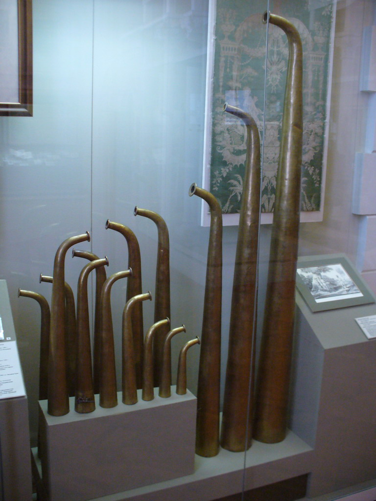 Трубы рогового оркестра, Россия, вторая половина XVIII века. Латунь, ковка.